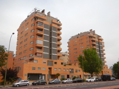 Edificios en la Avenida de Córdoba, barrio de Almendrales, Madrid.